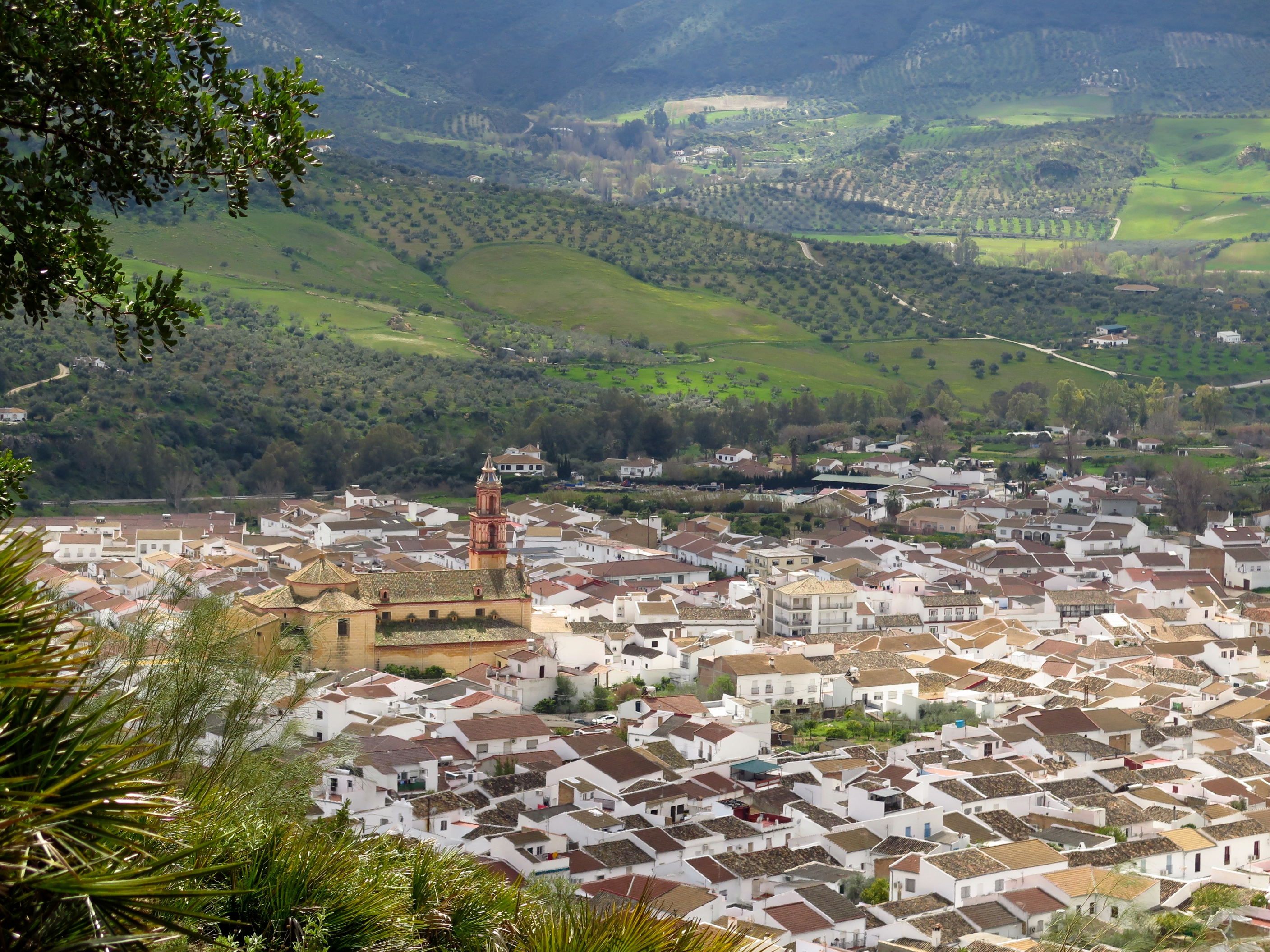 vista del pueblo de Algodonales desde el sendero de las fuentes